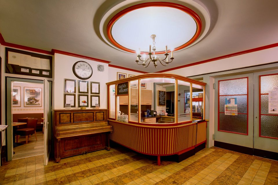 Eingangsbereich